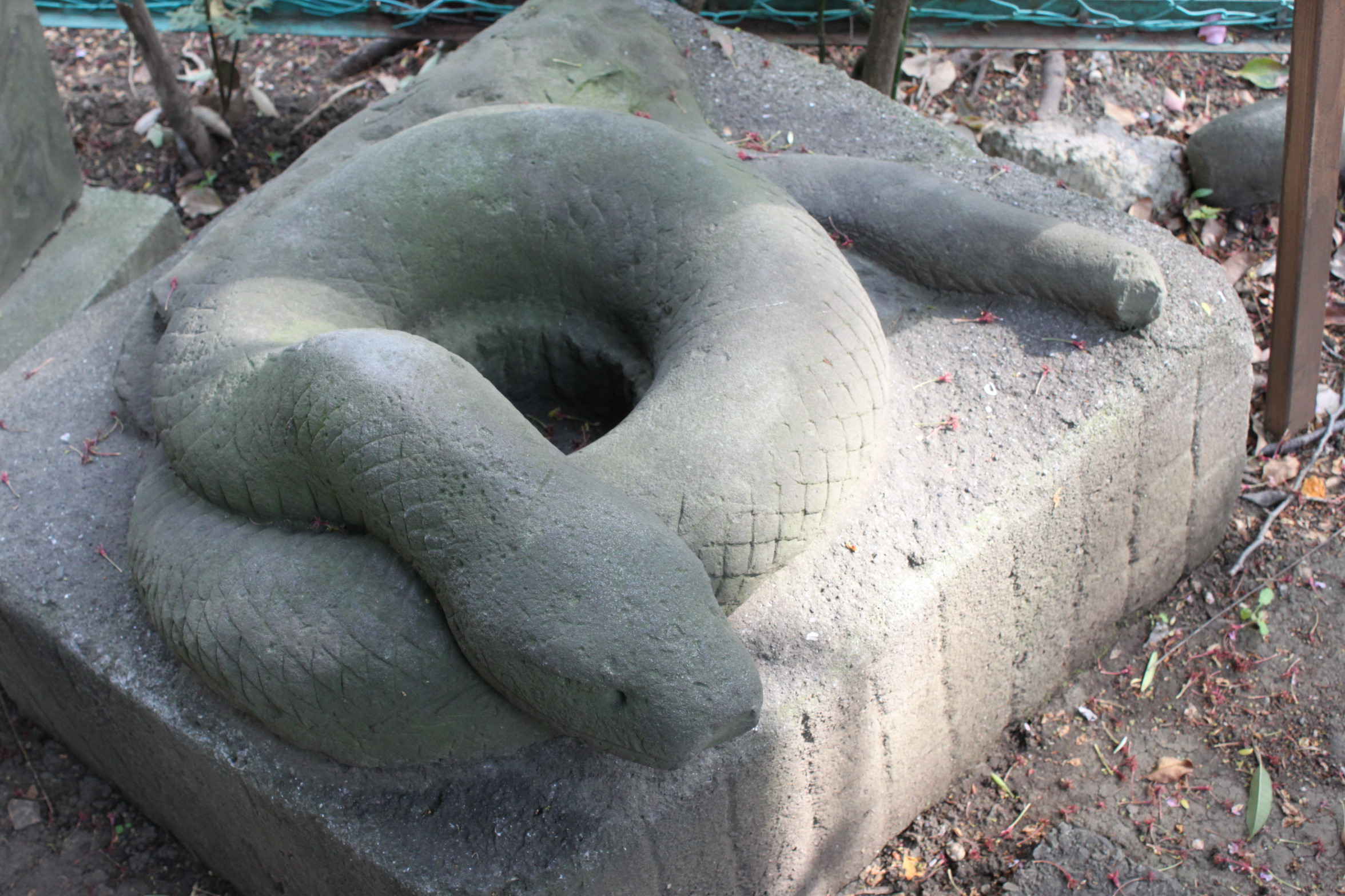 宝珠院大蛇